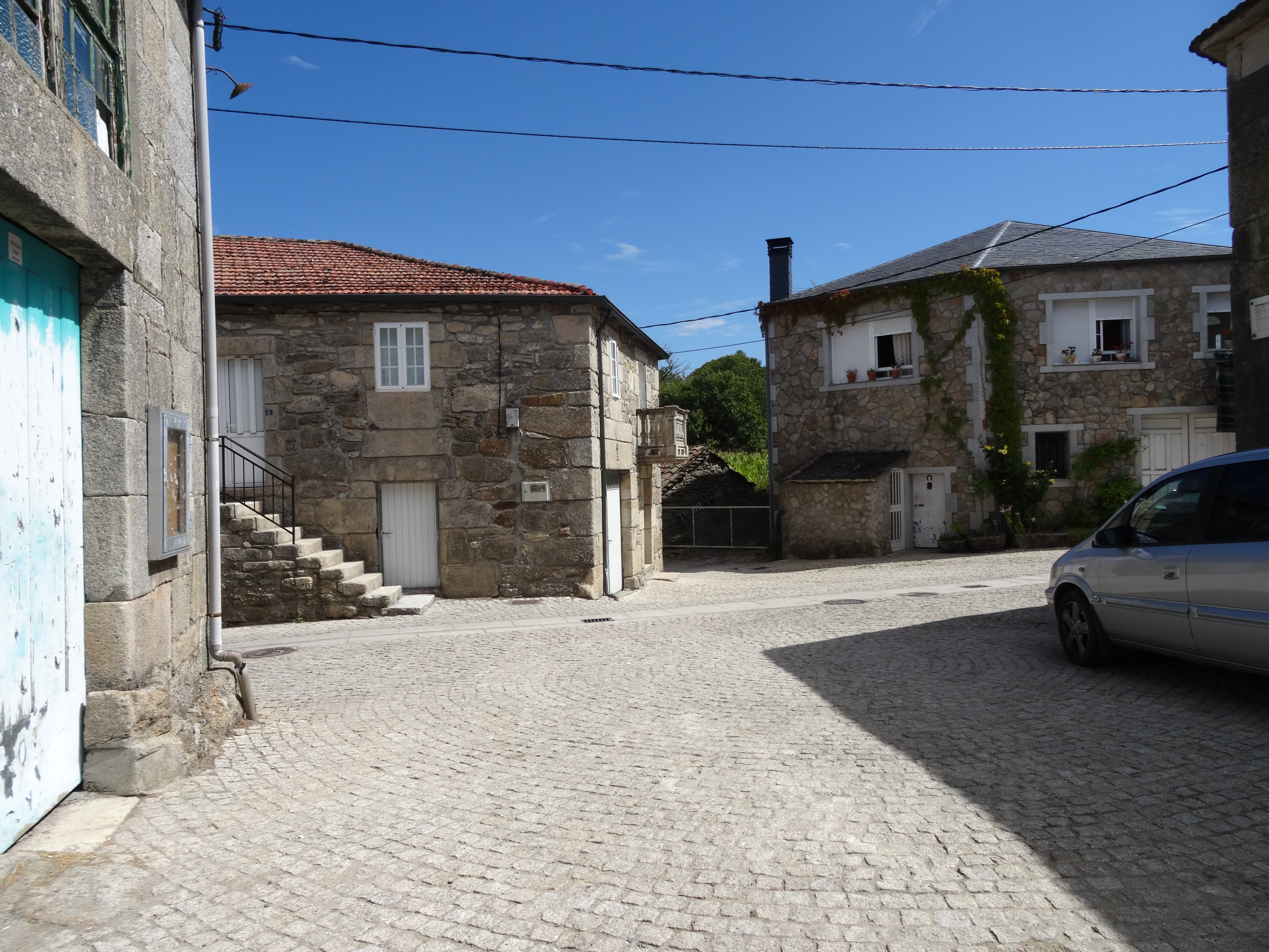 Ver título.